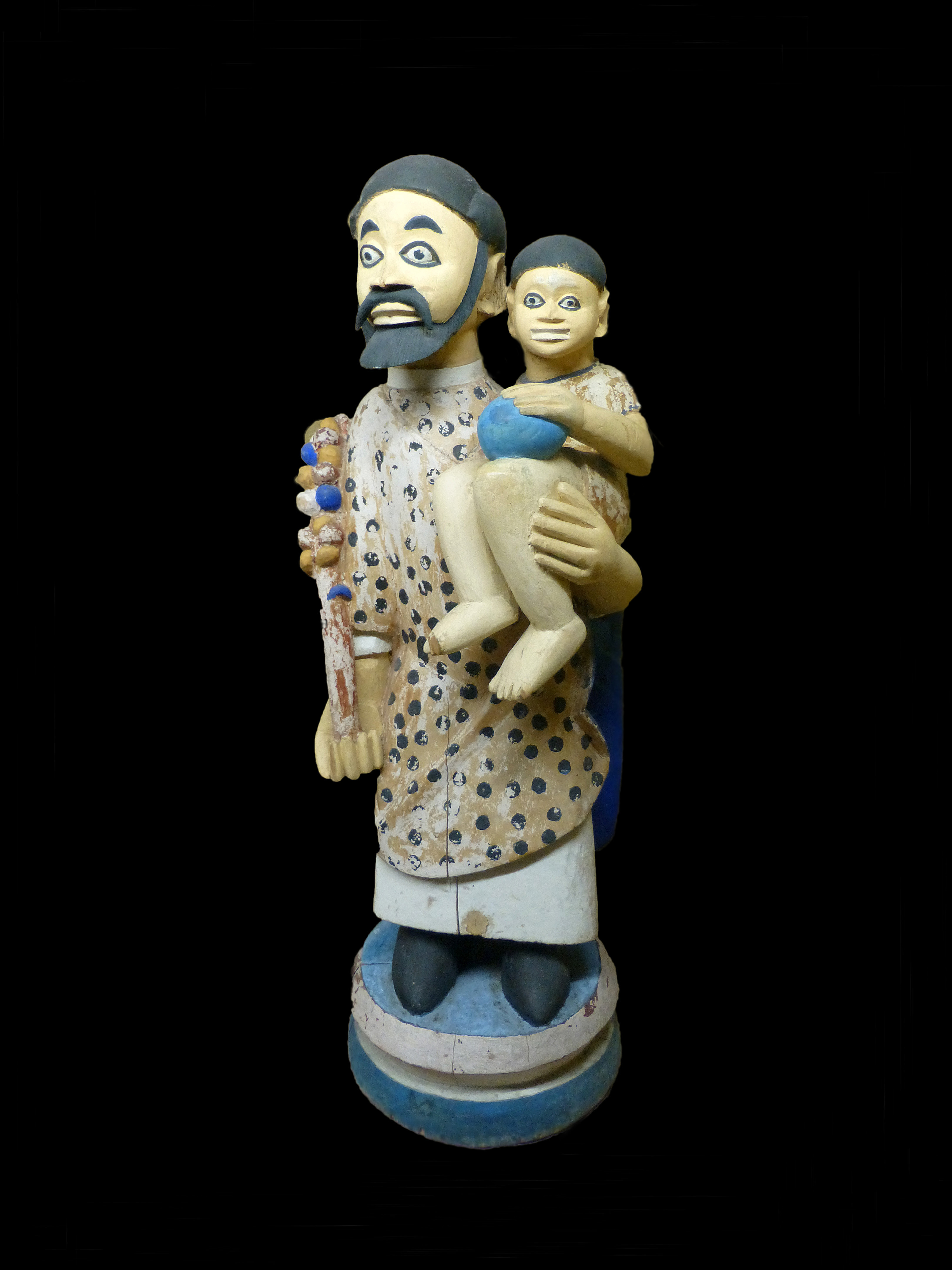 Saint Joseph et l'Enfant Jésus. Yoruba-Nago (Kétou), 1930. Musée africain de Lyon.